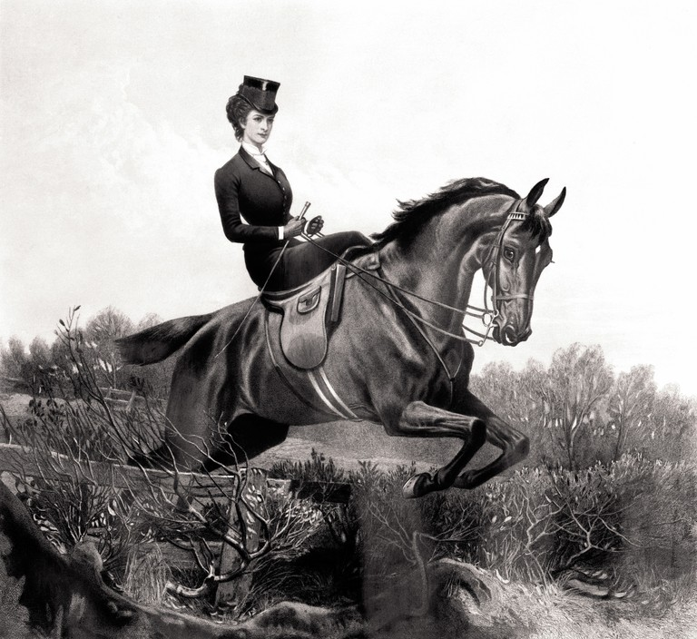 Kaiserin Elisabeth beim Hürdenritt, Stahlstich, 19. Jahrhundert; Bundesmobilienverwaltung